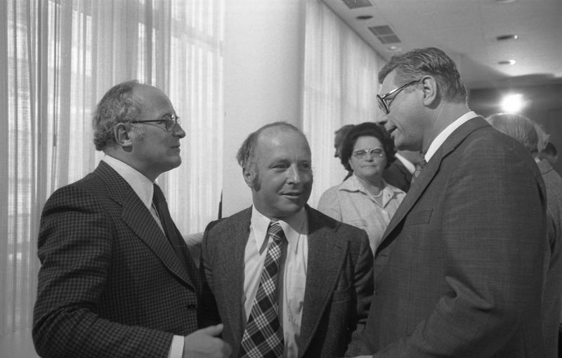 Erste Vorstandssitzung der CDU nach der Bundestagswahl in der CDU-Bundesgeschäftsstelle (Konrad-Adenauer-Haus) in Bonn